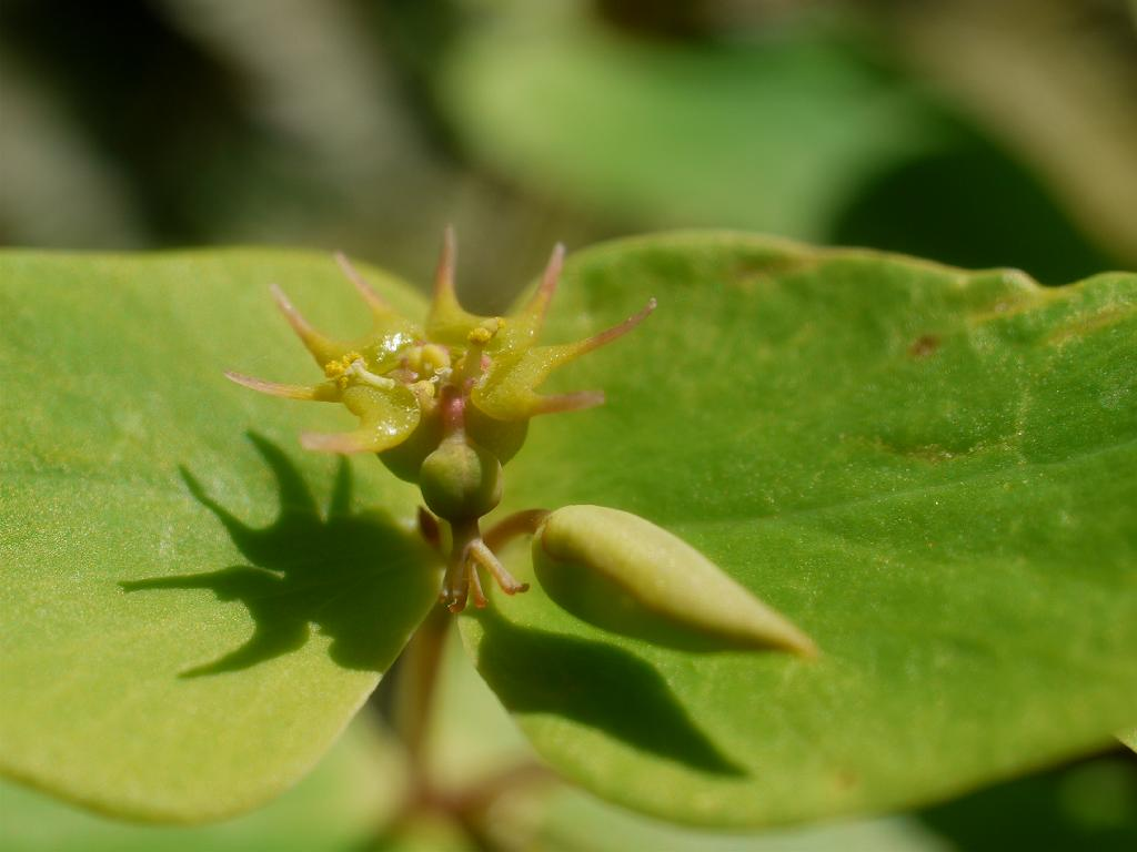 Euphorbia sieboldiana ナツトウダイ 2010.03.22 和歌山県田辺市